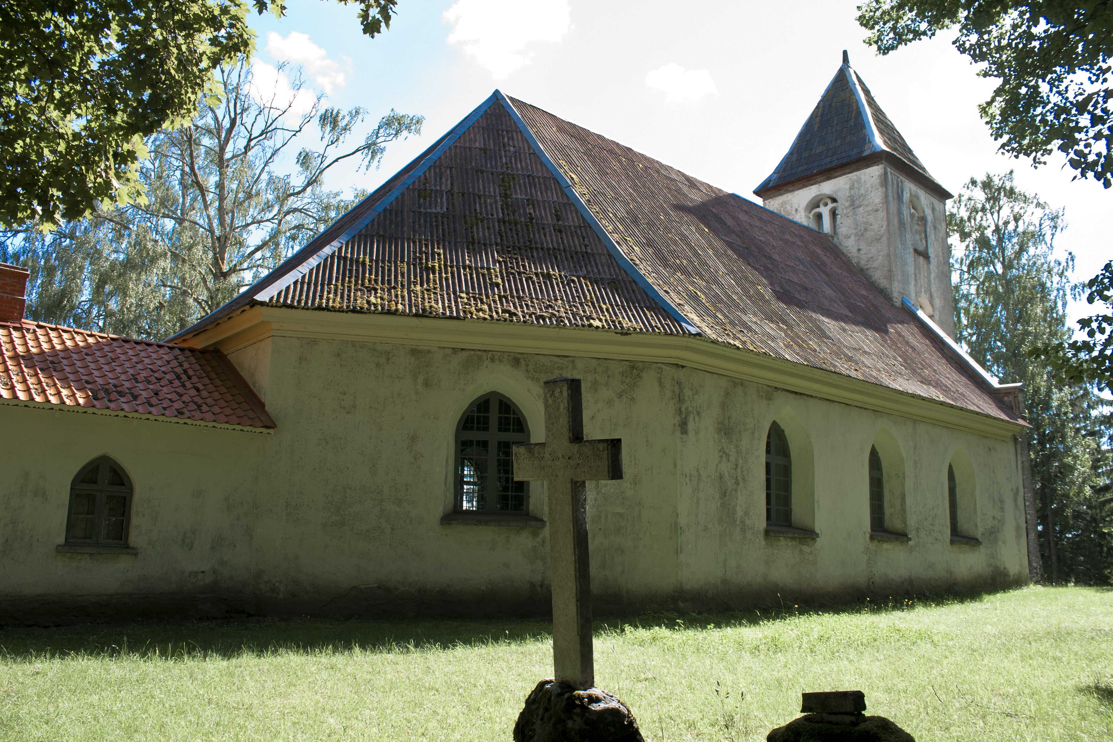 Gaiķi church